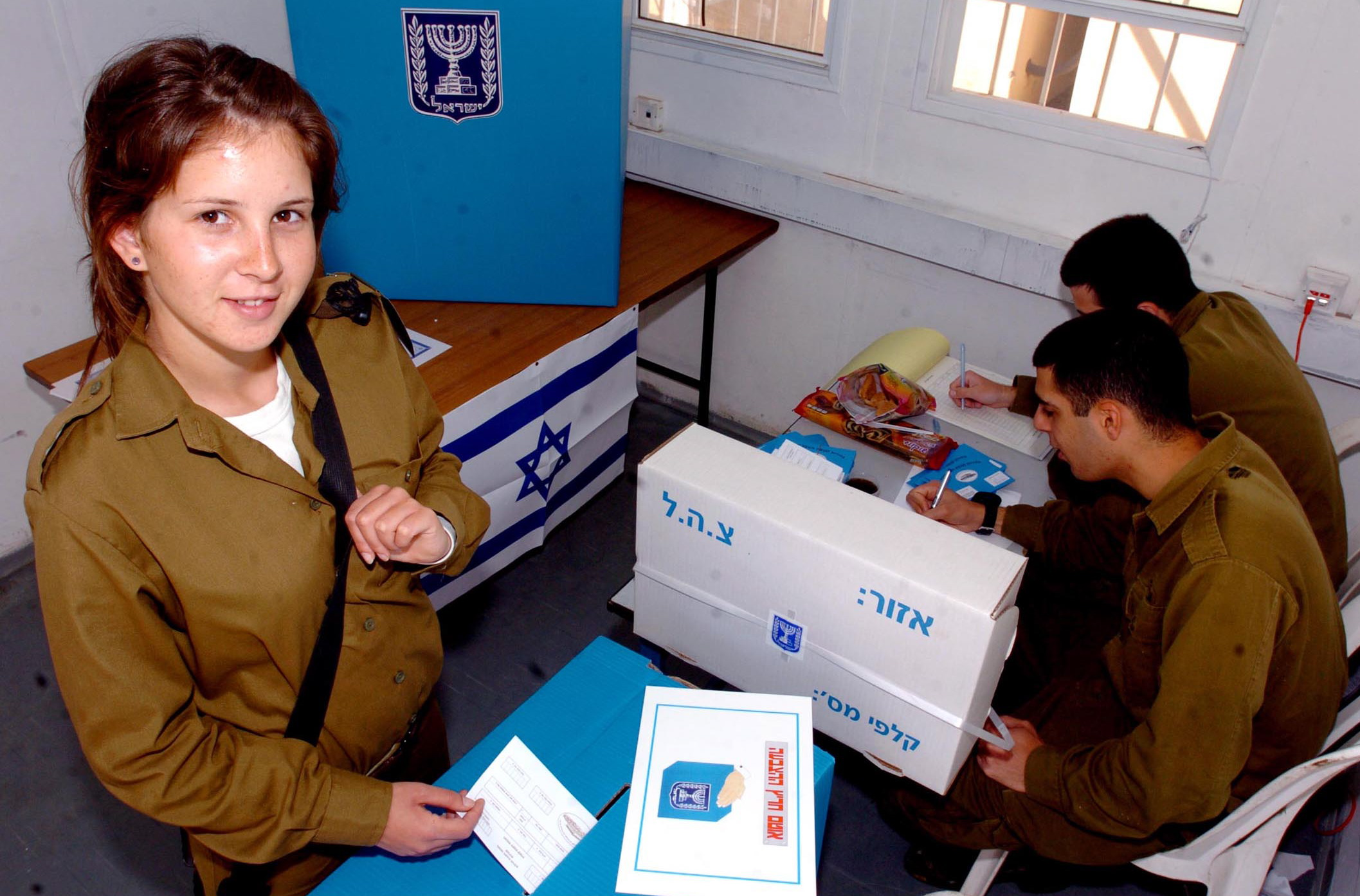 March 26, 2006. The IDF allows soldiers to vote on bases around Israel, and encourages them to exercise their democratic rights. Pictured: Soldiers from the Rosh Hanikra post in Northern Israel voting on the day of the elections. צה"ל מאפשר לחייליו להצביע בבסיסים ברחבי הארץ ומעודד אותם לממש את זכויותיהן הדמוקרטיות. בתמונה: חיילים ממוצב ראש הנקרה בצפון הארץ מצביעים ביום הבחירות.